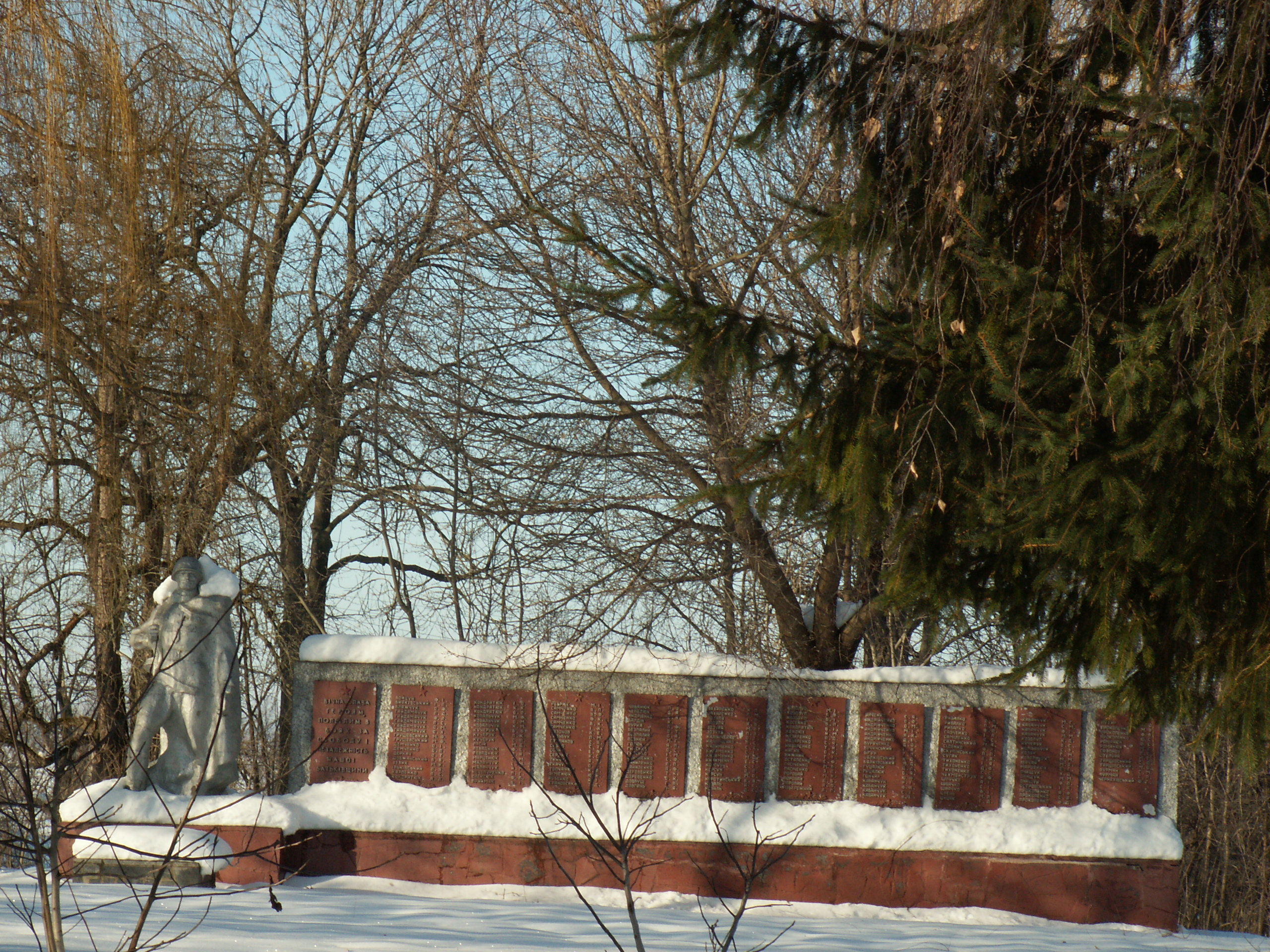 Меморіал учасникам Великої вітчизняної війни в с. Колюхів